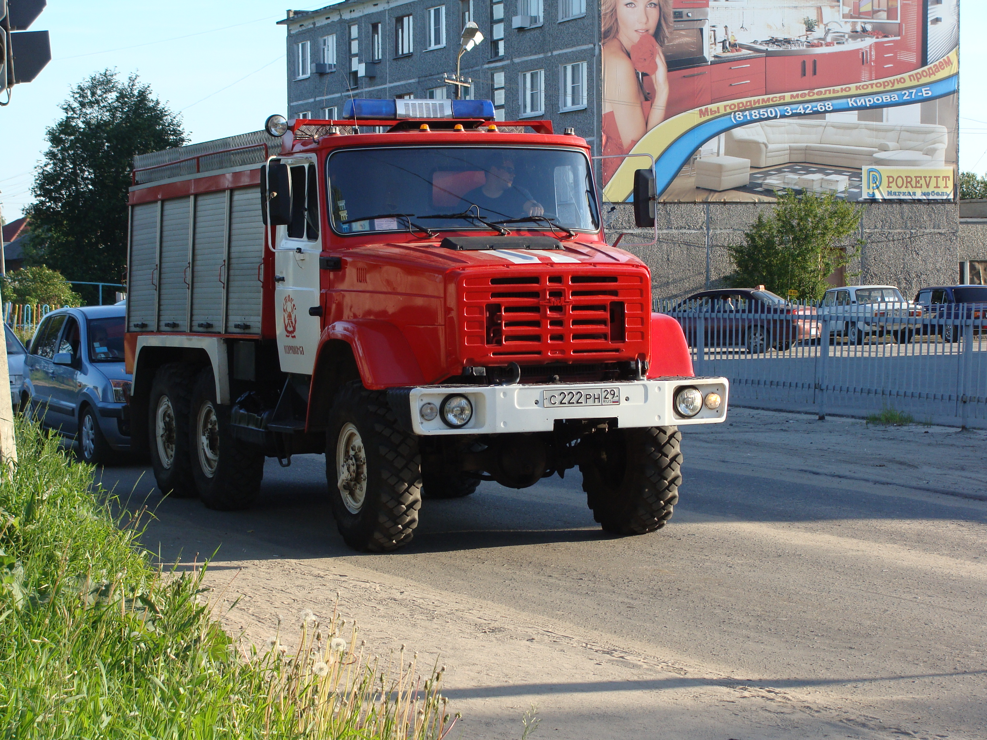 ПНС-110. СПАСС, Коряжма